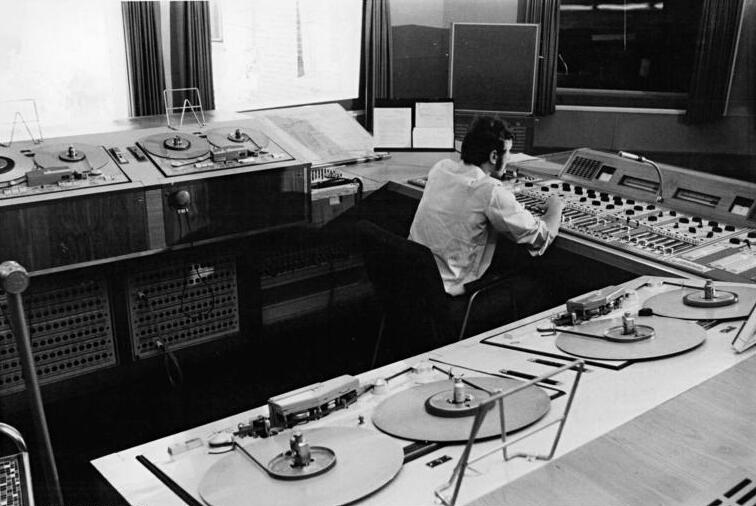 Berlin, Nalepastraße, Sendezentrum, Senderaum Zentralbild Deutsche Demokratische Republik 31.7.1970 schw Deutscher Demokratischer Rundfunk - Ätherwellen-Brücke zur Völkerbrständigung. Unser Foto zeigt einen der Senderäume, über die die Aufnahmen aus den Studios und Sprecherkabinen in die Zentrale gelangen. Hier trägt der Kontroll-Techniker Horst Schickram für eine gute Übertragung Sorge. Reporter: Junge Copyright: ADN-Zentralbild (Bitte beachten Sie den Begleittext sowie die Fotos mit den Nummern J0701-301-1-9N)